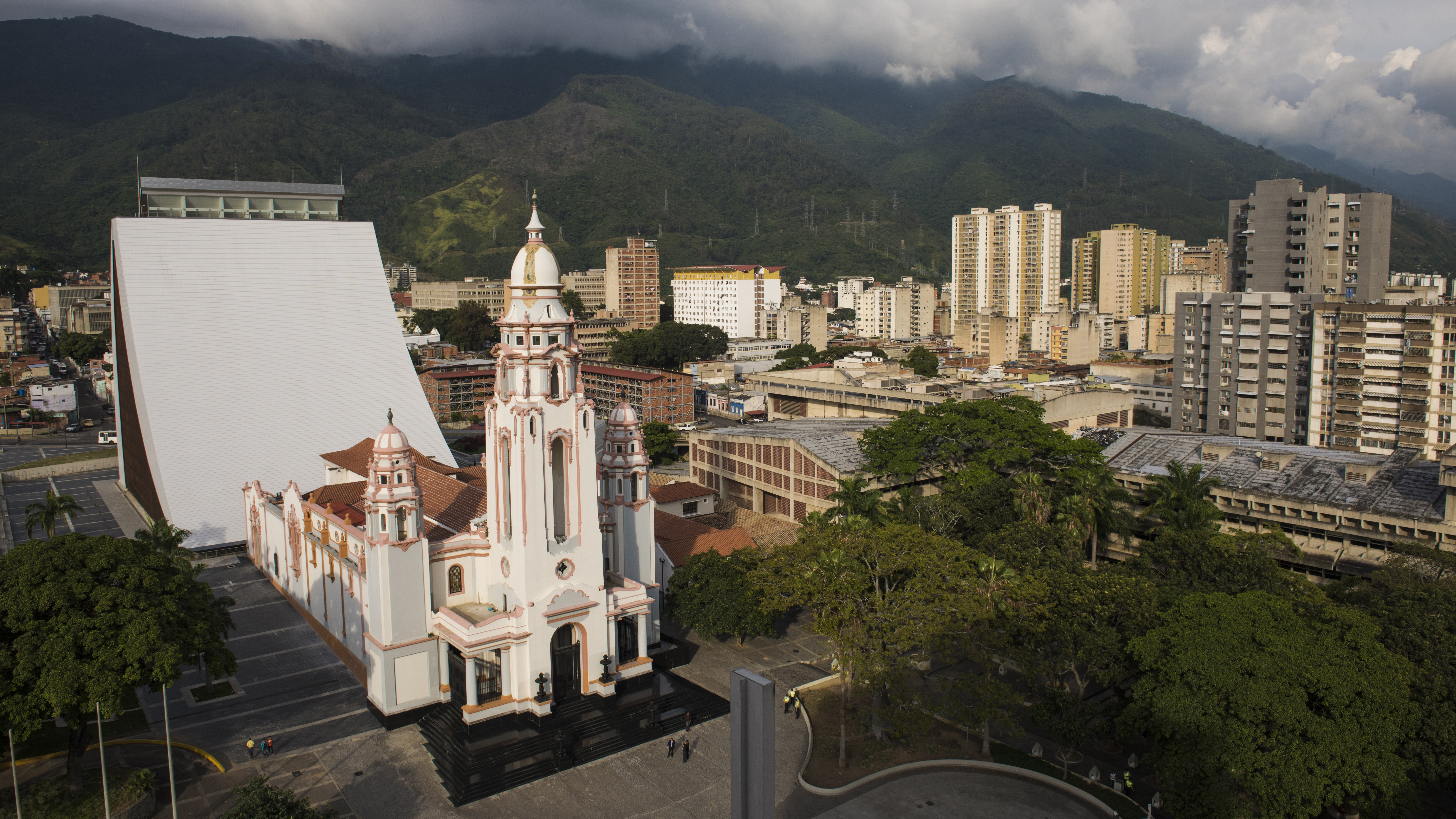 Vista del Panteón Nacional de Venezuela desde uno de los balcones del Ministerio de Comunicación.